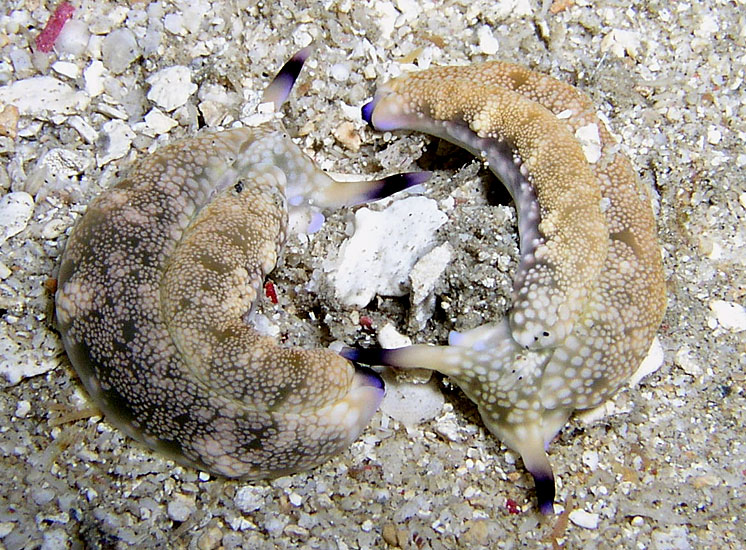 Plakobranchus ocelatus